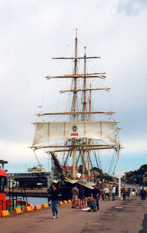 T/S Gunilla i Oskarshamn.